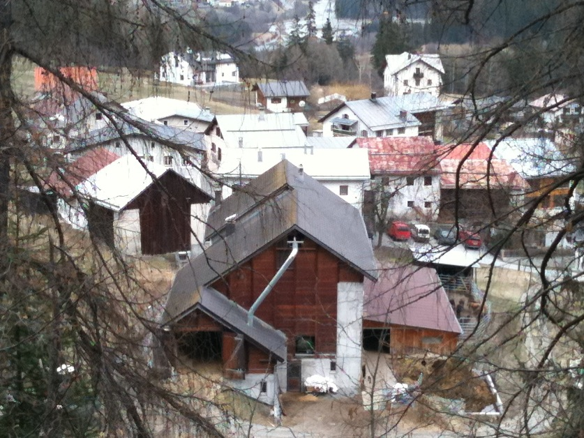 Seraplana im Unterengadin, Kanton Graubünden